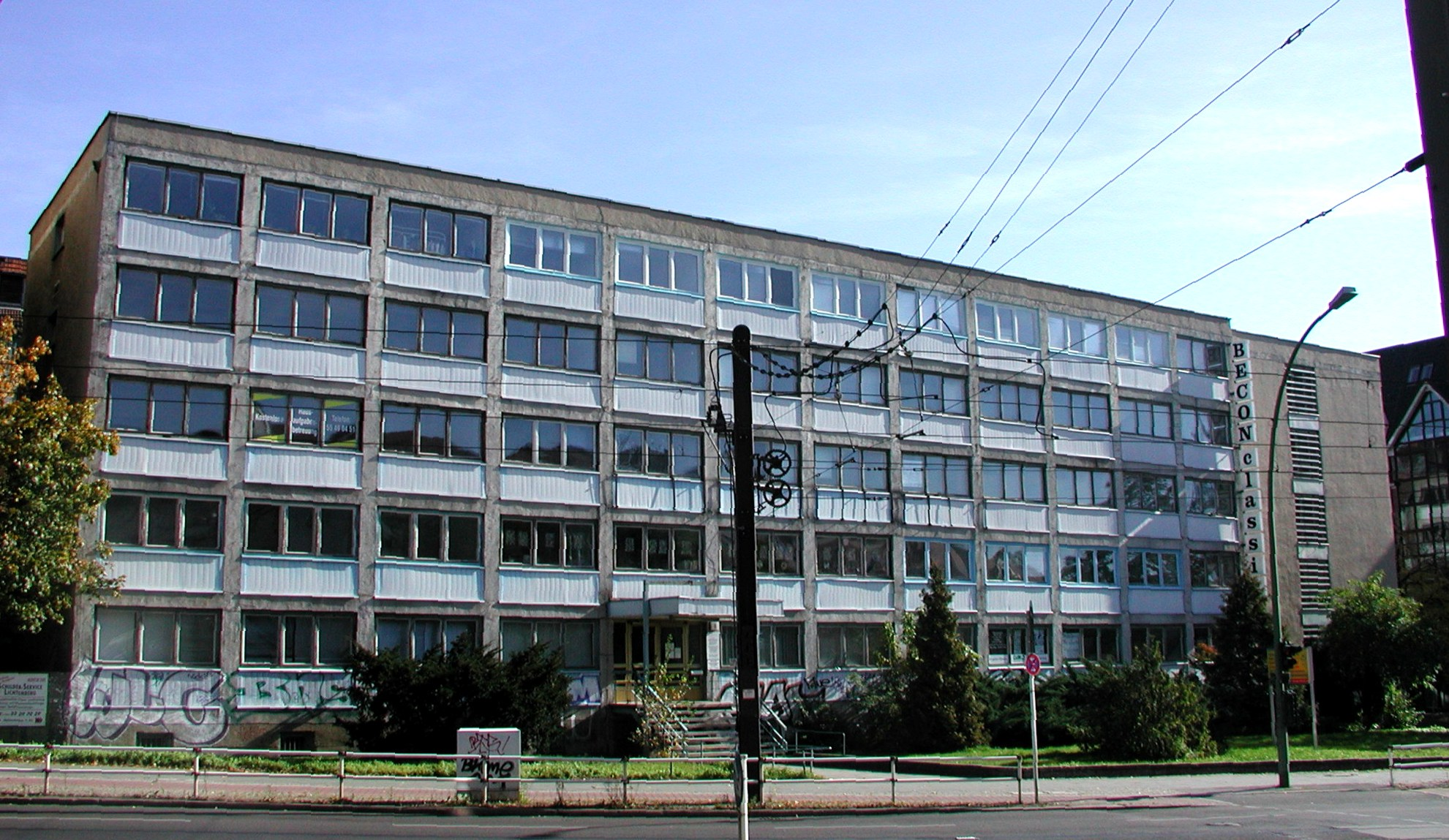 Das Verwaltungsgebäude des ehemaligen VEB Fortschritt Herrenbekleidung